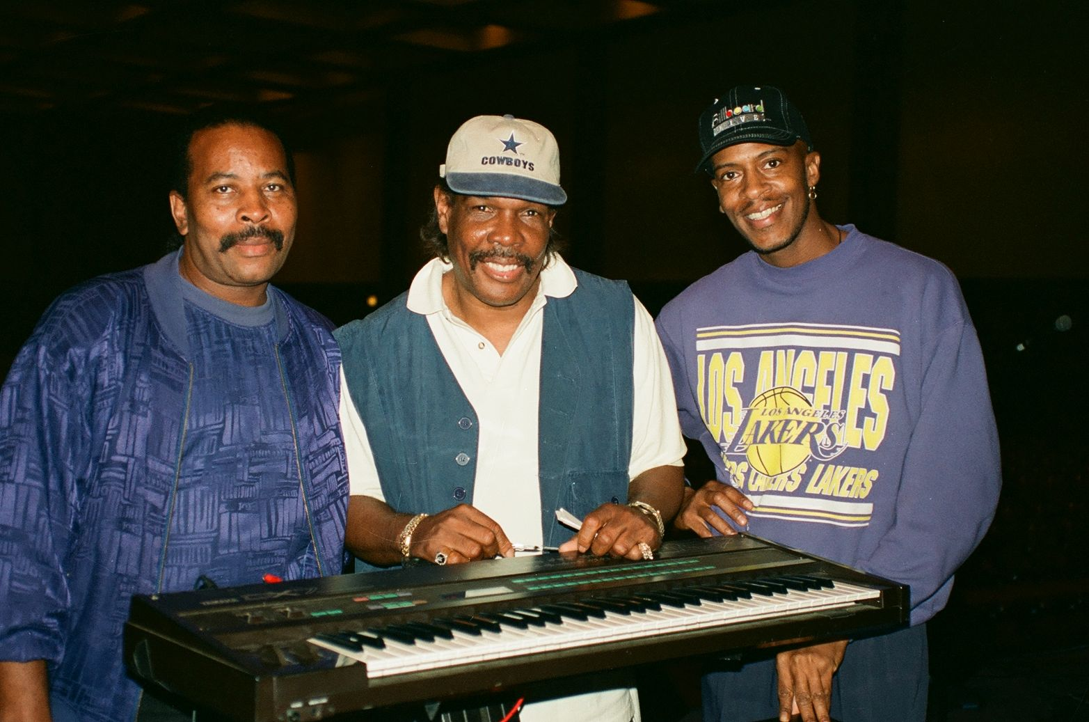 Wash D.C. 1996